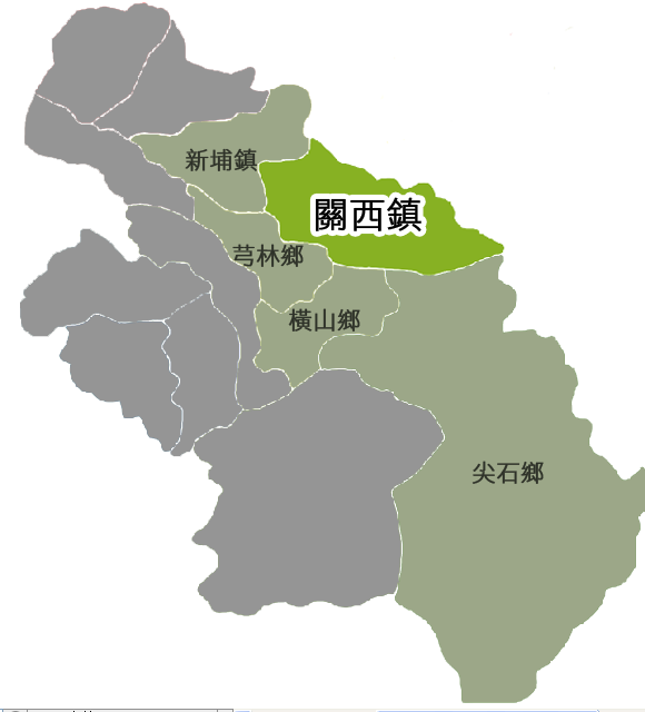 新竹縣關西鎮相對位置。